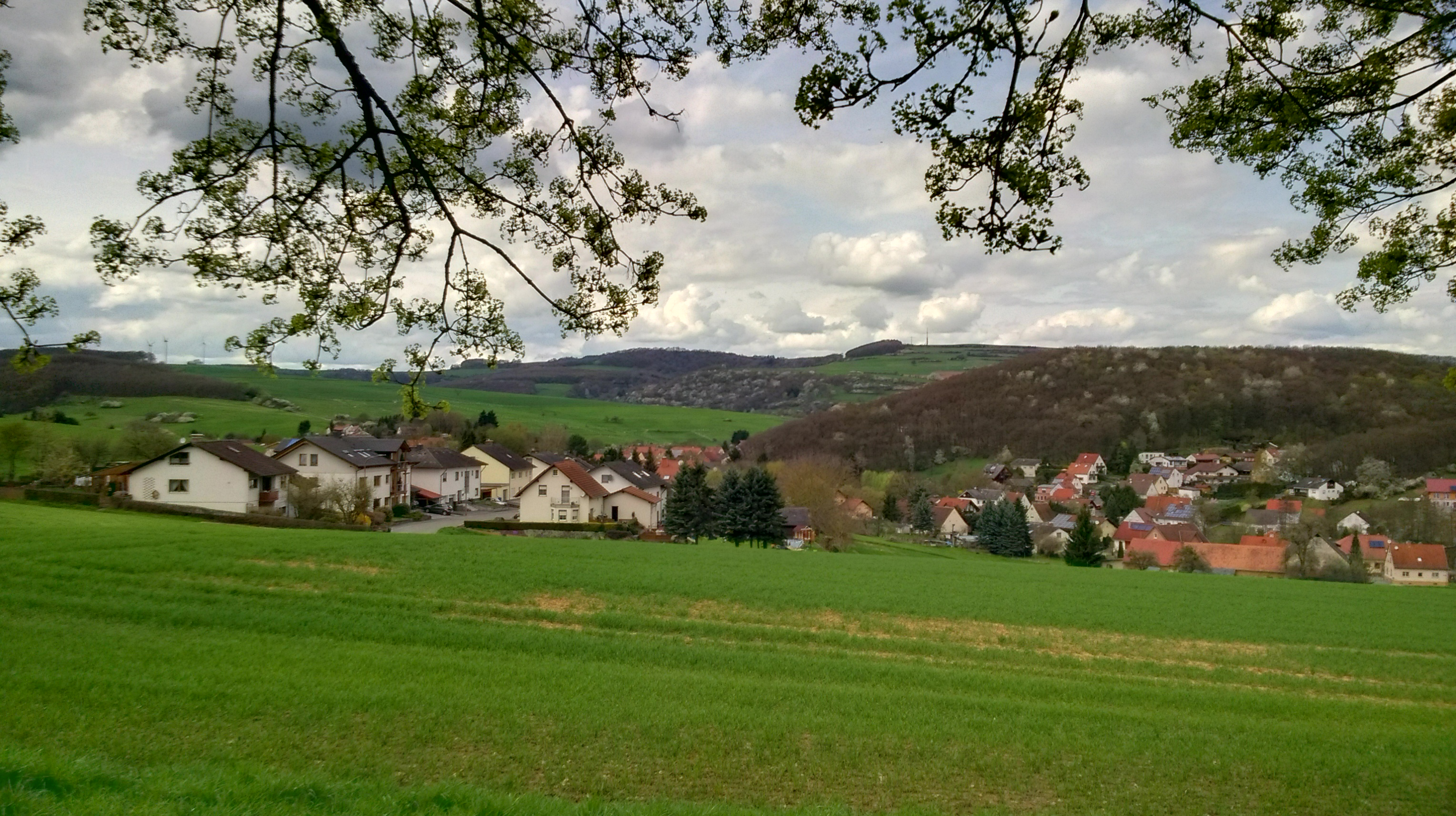 Blick auf Dörnbach vom Spielplatz oberhalb des Imsweilerwegs. Links im Bild der Imsweilerweg. Rechts der untere Teil der Hauptstraße, die Waldstraße und das Neubaugebiet Im Schlüssel.